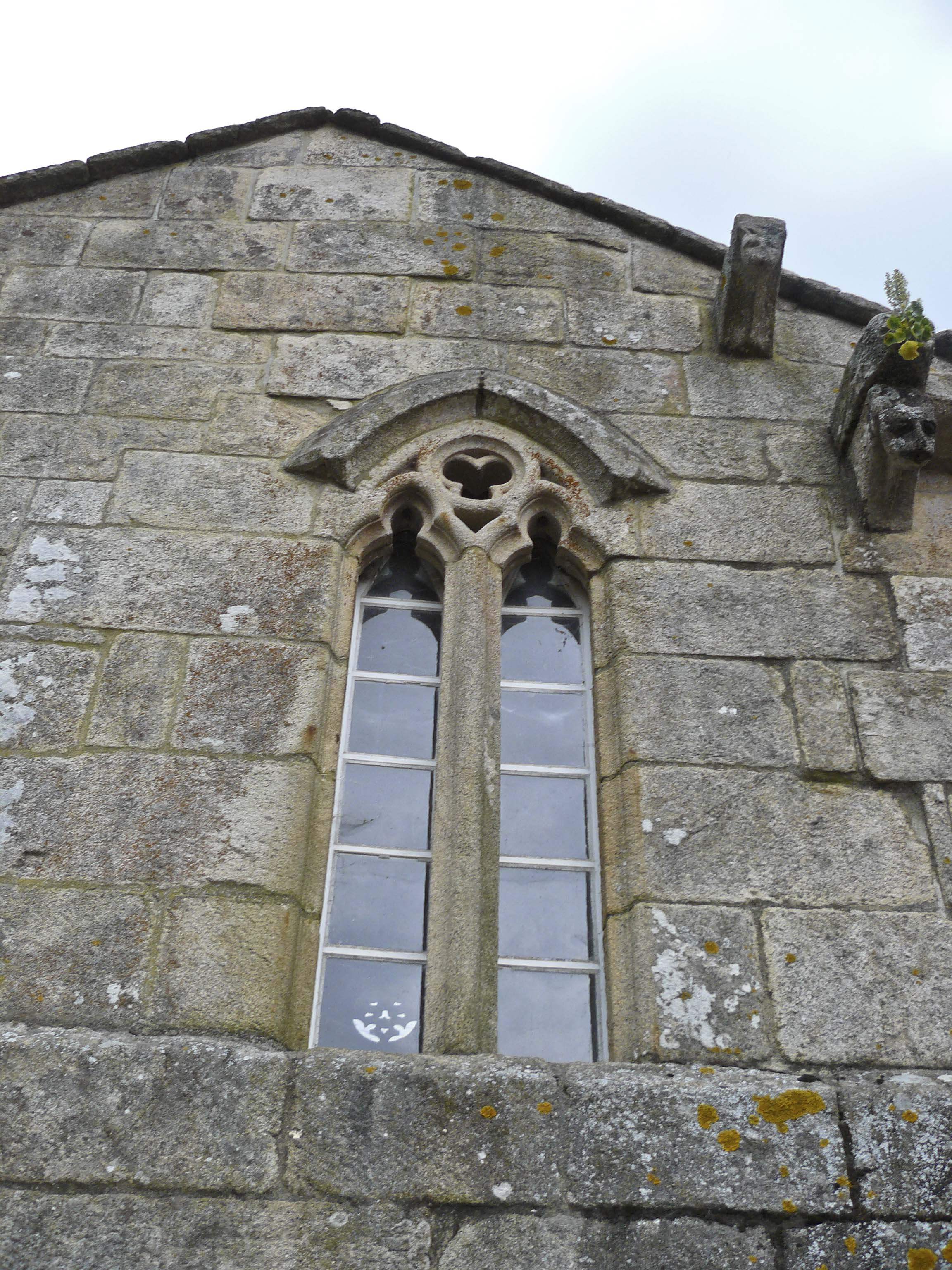 San Pedro de Ansemil. Capela dos Deza. Ventá.